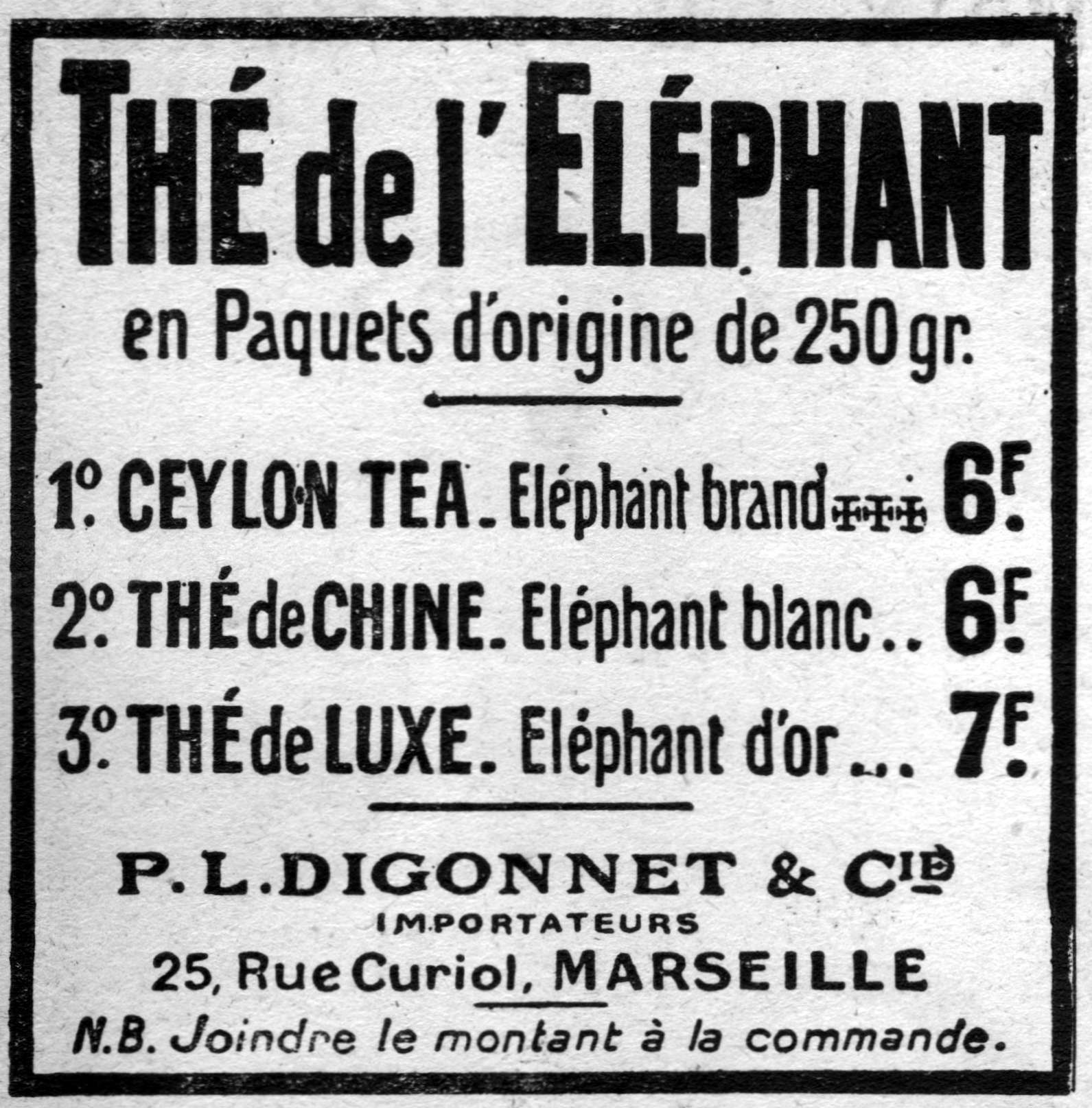 Scan of L'ILLUSTRATION No 3908 26 Janvier 1918. Thé de l'Eléphant No 3908 Cover inside.